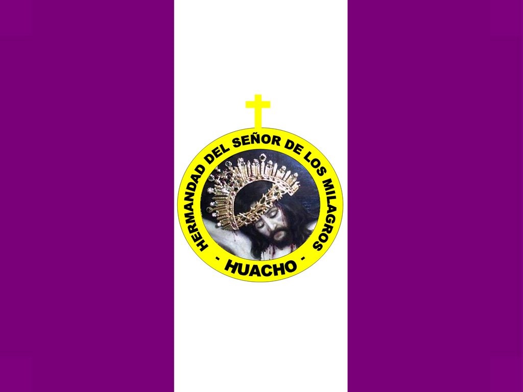 nueva bandera de la hermandad, creada por el hno. alexis carreño